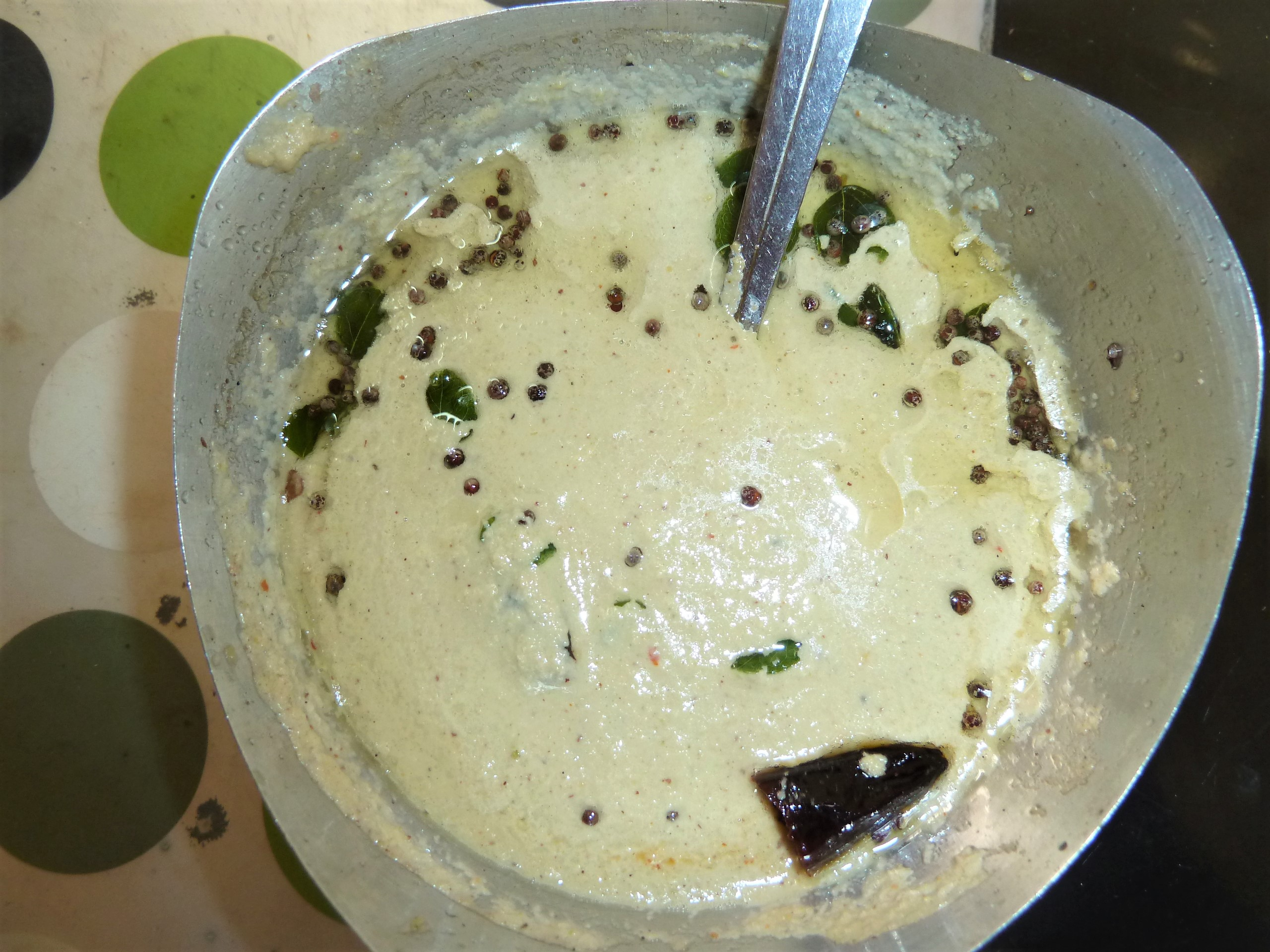 వేరుశనగ పప్పు మరియు కొబ్బరితో చట్నీ